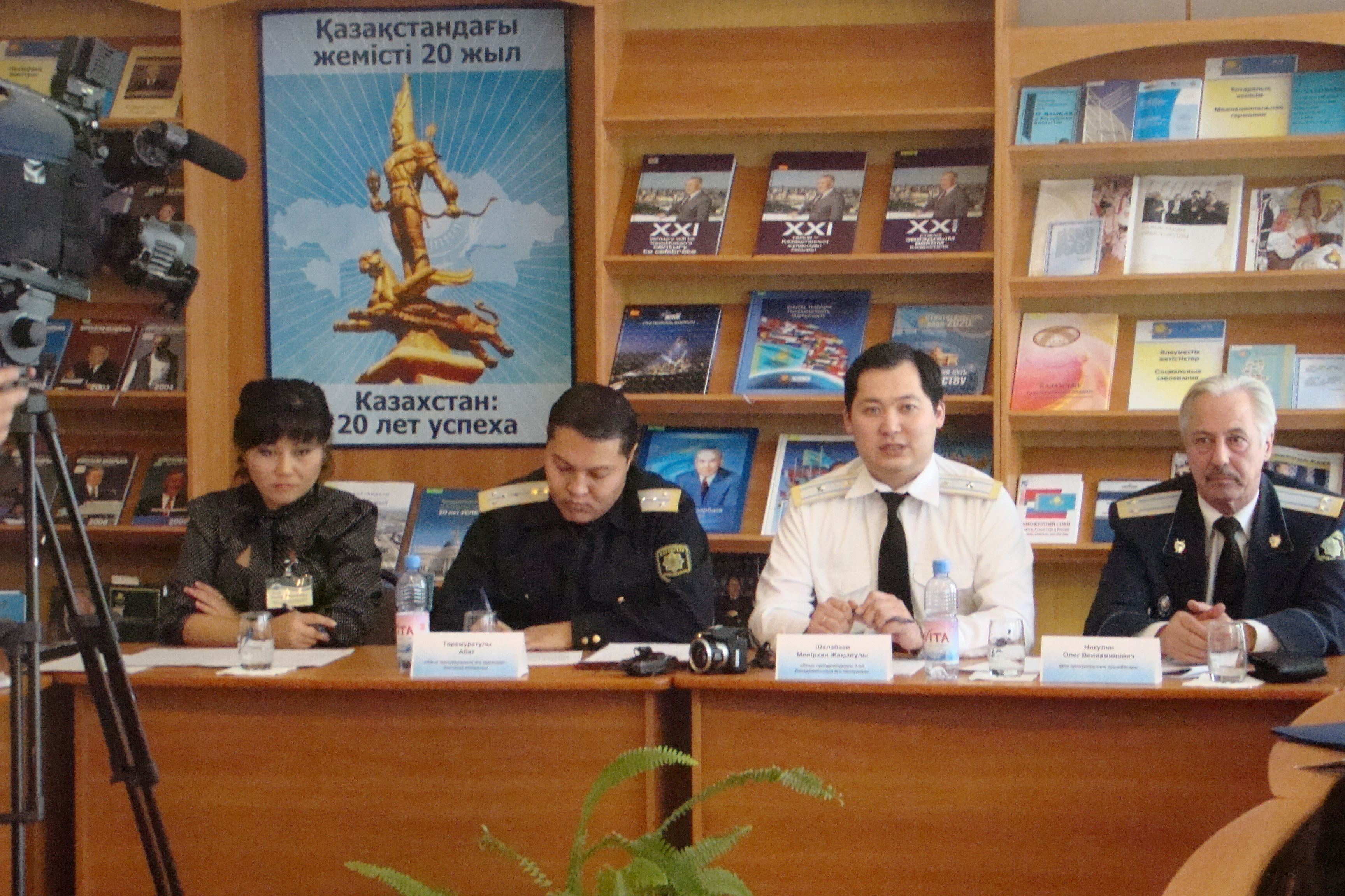 Отдел выставочно-массовой работы (Костанайская областная универсальная научная библиотека им. Л. Н. Толстого)